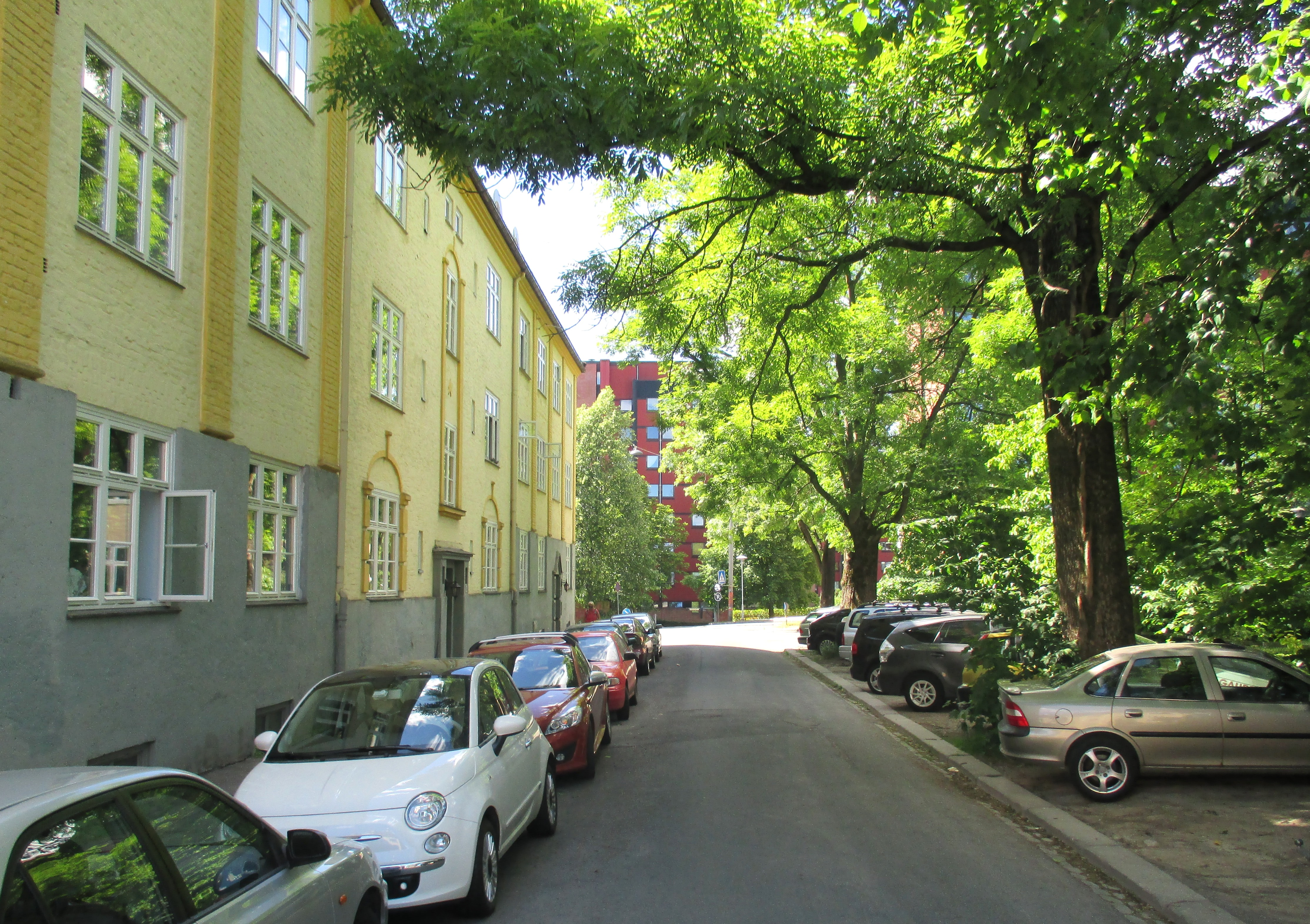 Lammers' gate på Torshov i Oslo